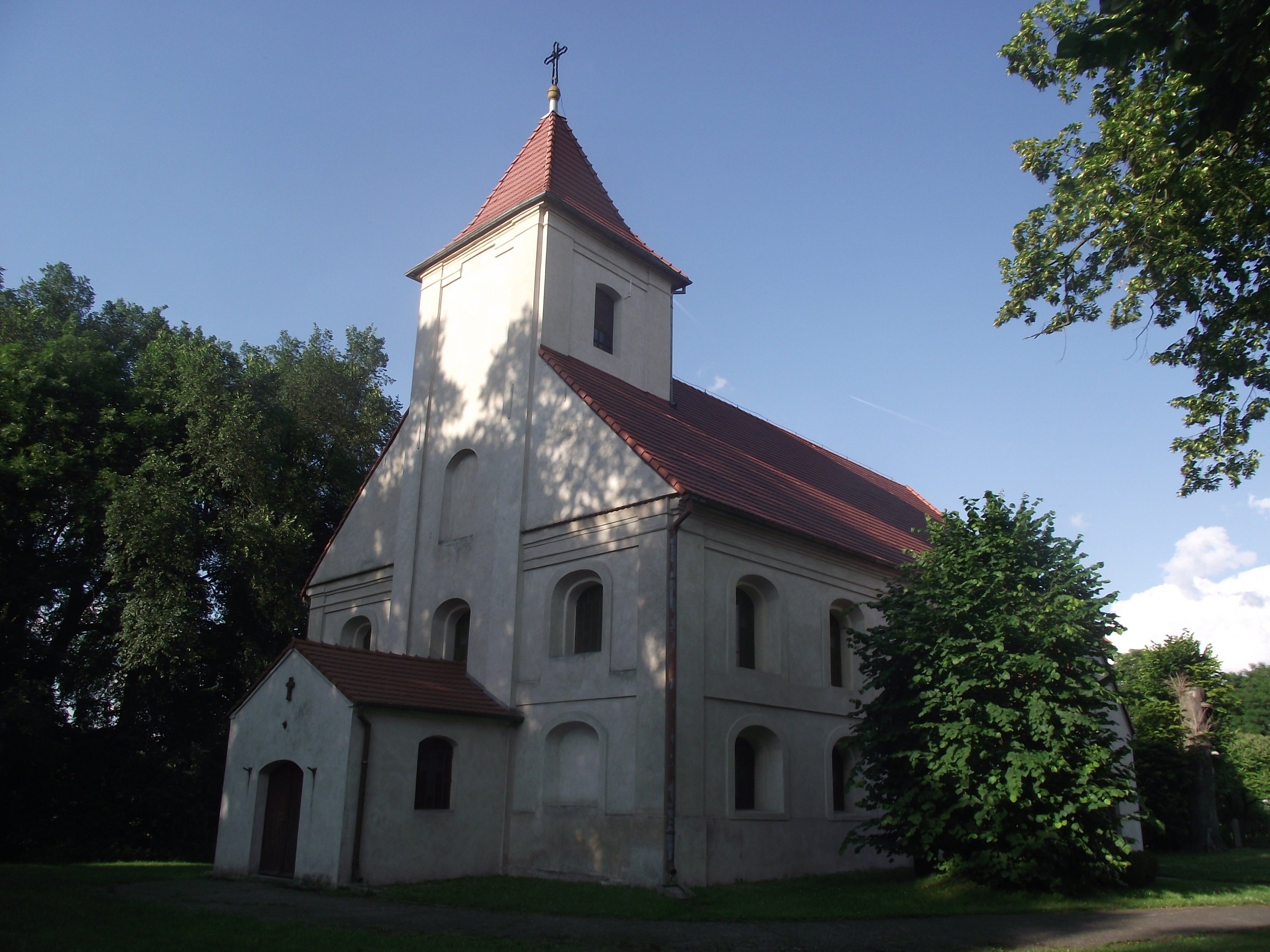 Kępsko - dawny kościół ewangelicki, ob. rzymskokatolicki filialny p.w. Niepokalnego Serca NMP z 1 poł. XVIII w.